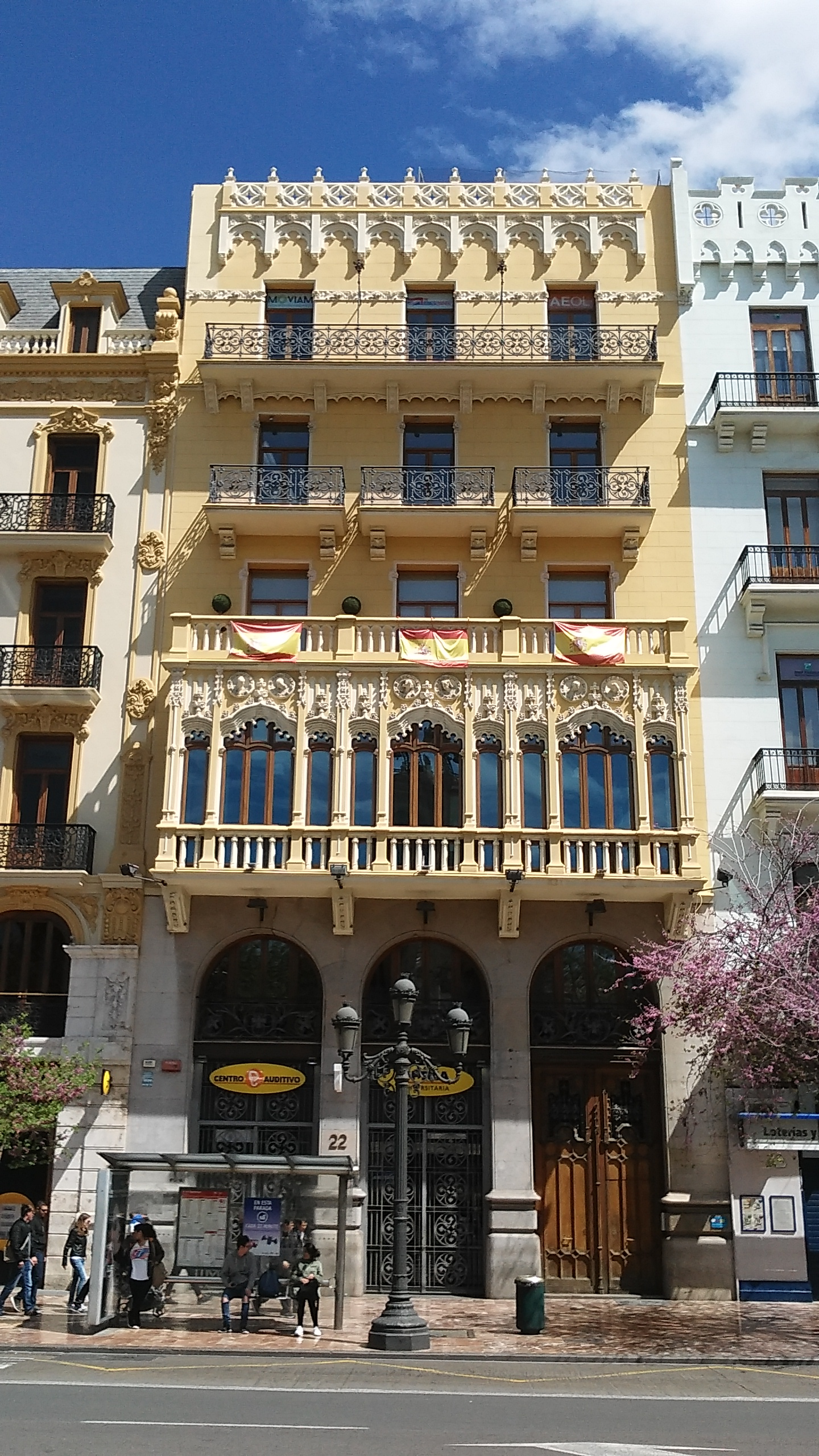 Casa Noguera, en la plaça de l'Ajuntament número 22 de Valéncia. Obra modernista de l'arquitecte Francisco Mora, 1909.